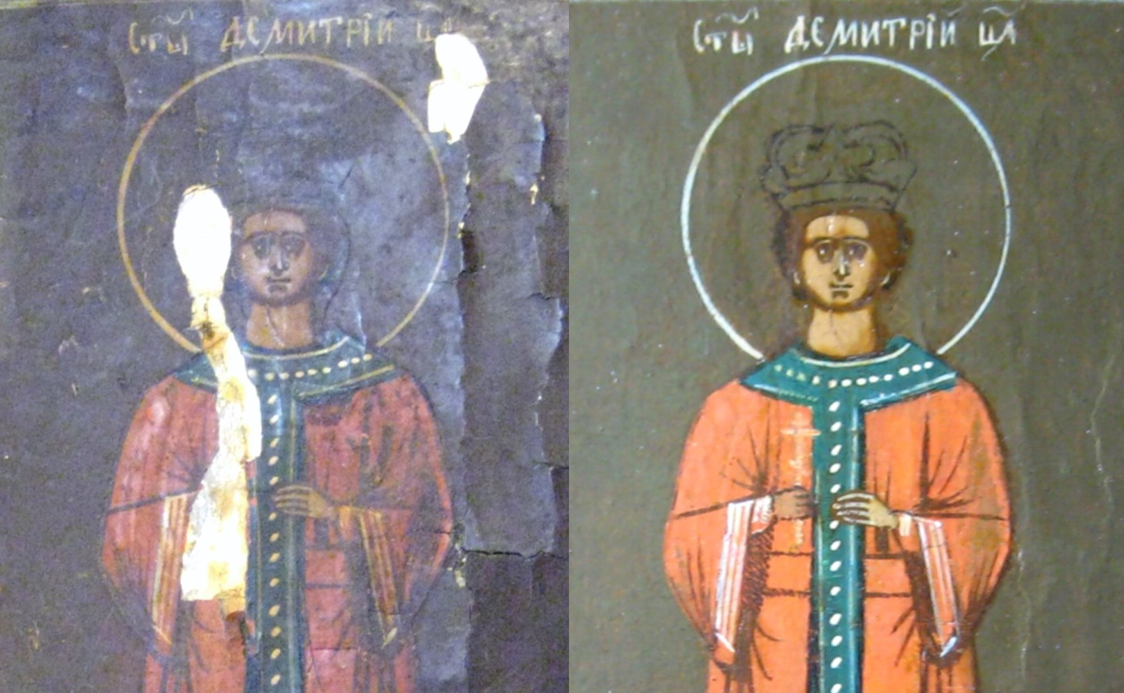 Реставрация иконы царевича Дмитрия (фрагменты). До и после. Restoration of icon of tsarevits Dmitriy. Before and after